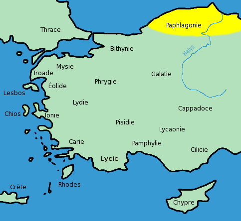 Carte de la Paphlagonie